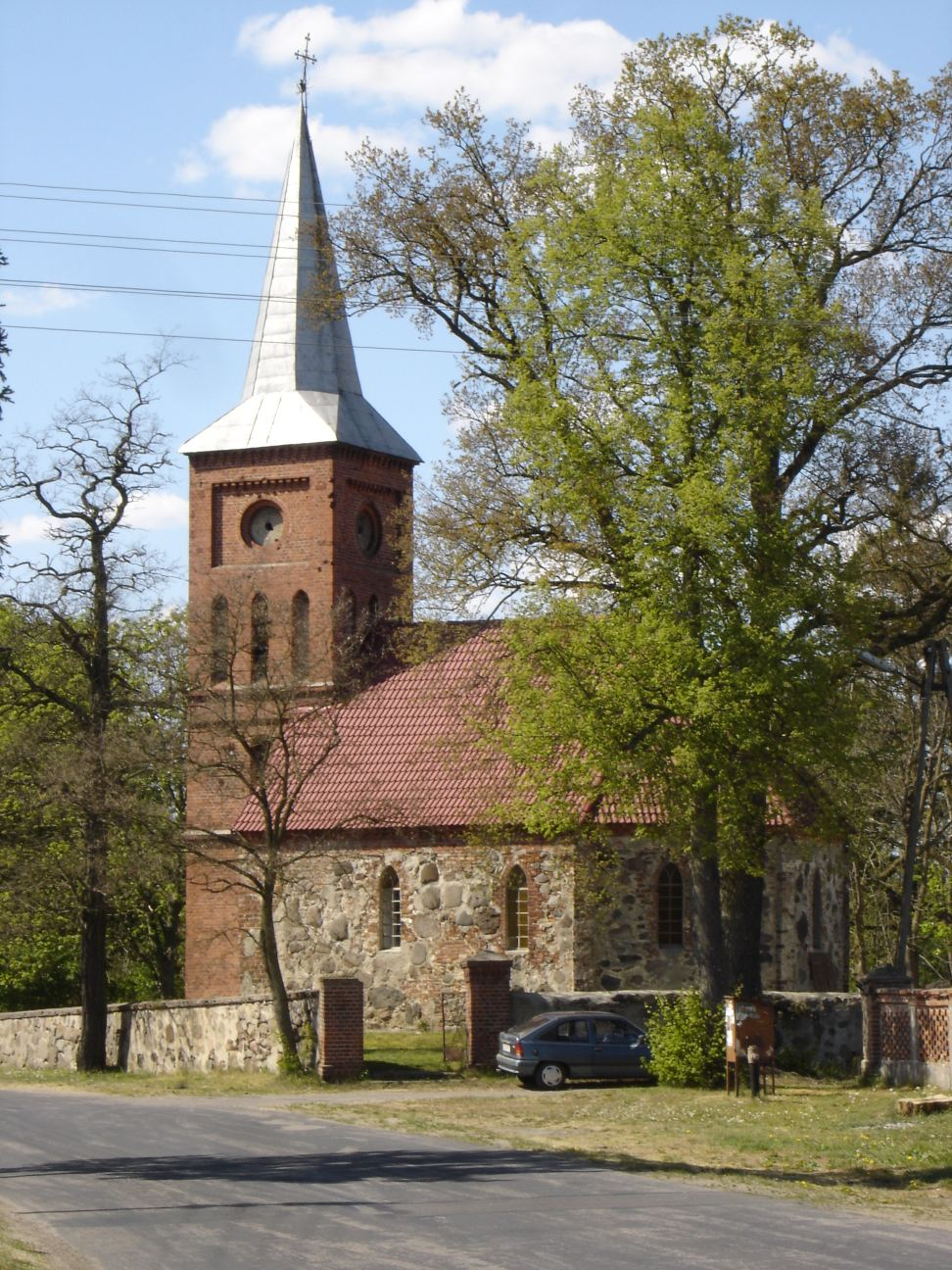 Smogolice - kościół pw. św. Piotra i Pawła (zabytek nr rejestr. 767)